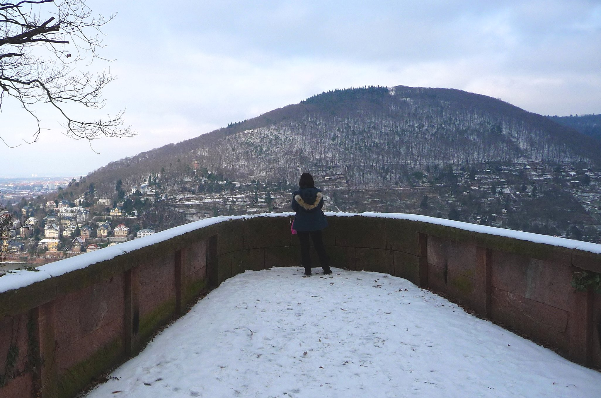 Aussichtskanzel Riesenstein am Hang des Gaisbergs direkt über der Heidelberger Altstadt (Baden-Württemberg, Deutschland), hier fotografiert mit Blick auf den Heiligenberg und den Heidelberger Stadtteil Neuenheim